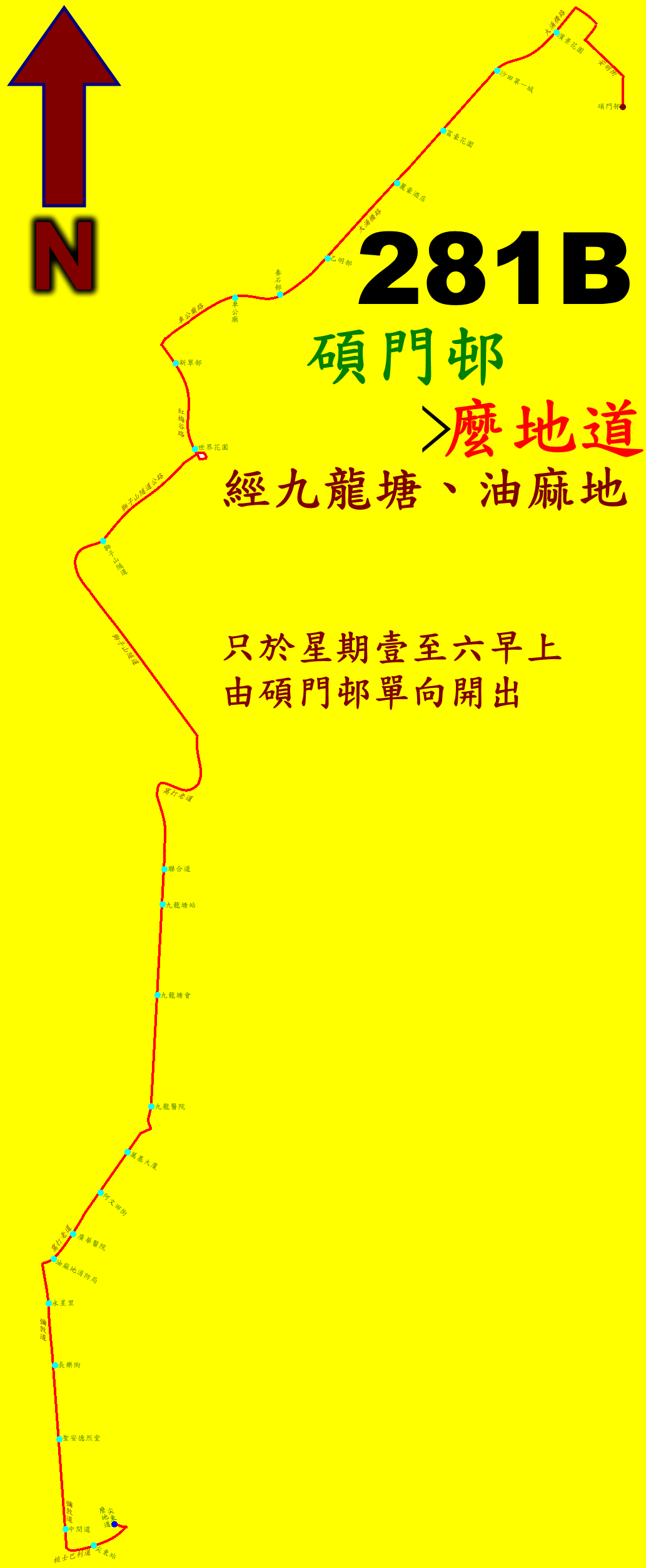 中文（香港）: 九巴281B線的走線圖